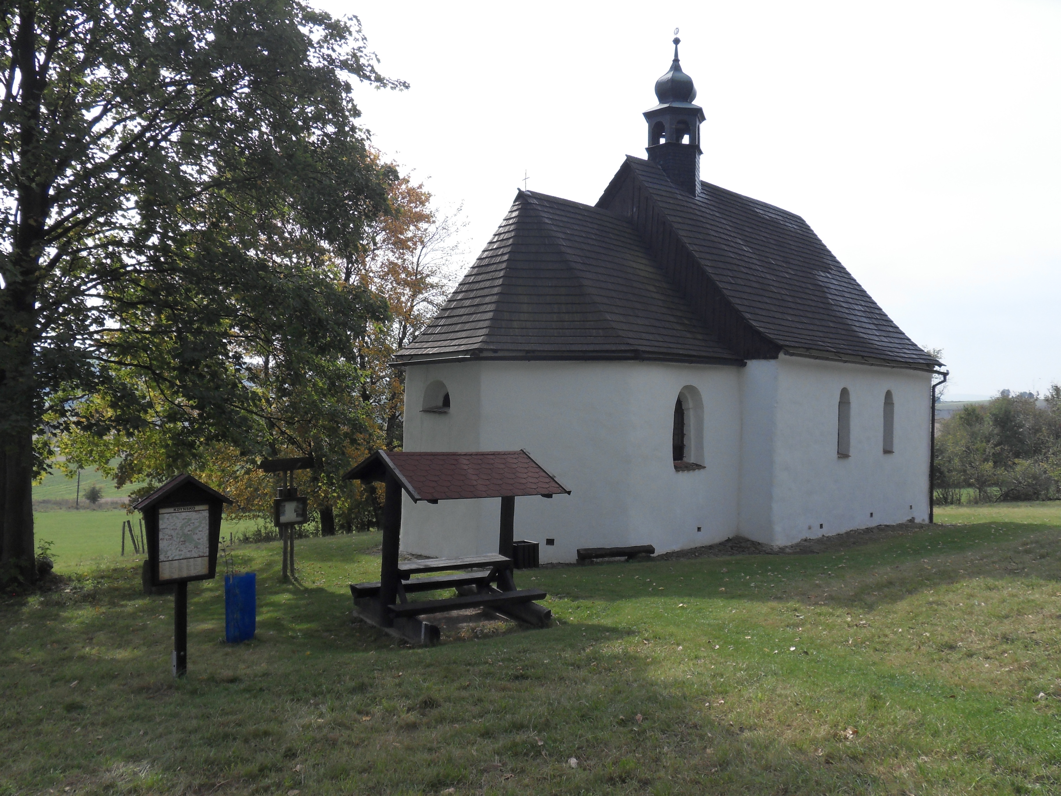 Pohled od severovýchodu na kapli svatého Václava, nacházející se na západě vsi poblíž cesty k zaniklé osadě Studánky, Brůdek (Všeruby).